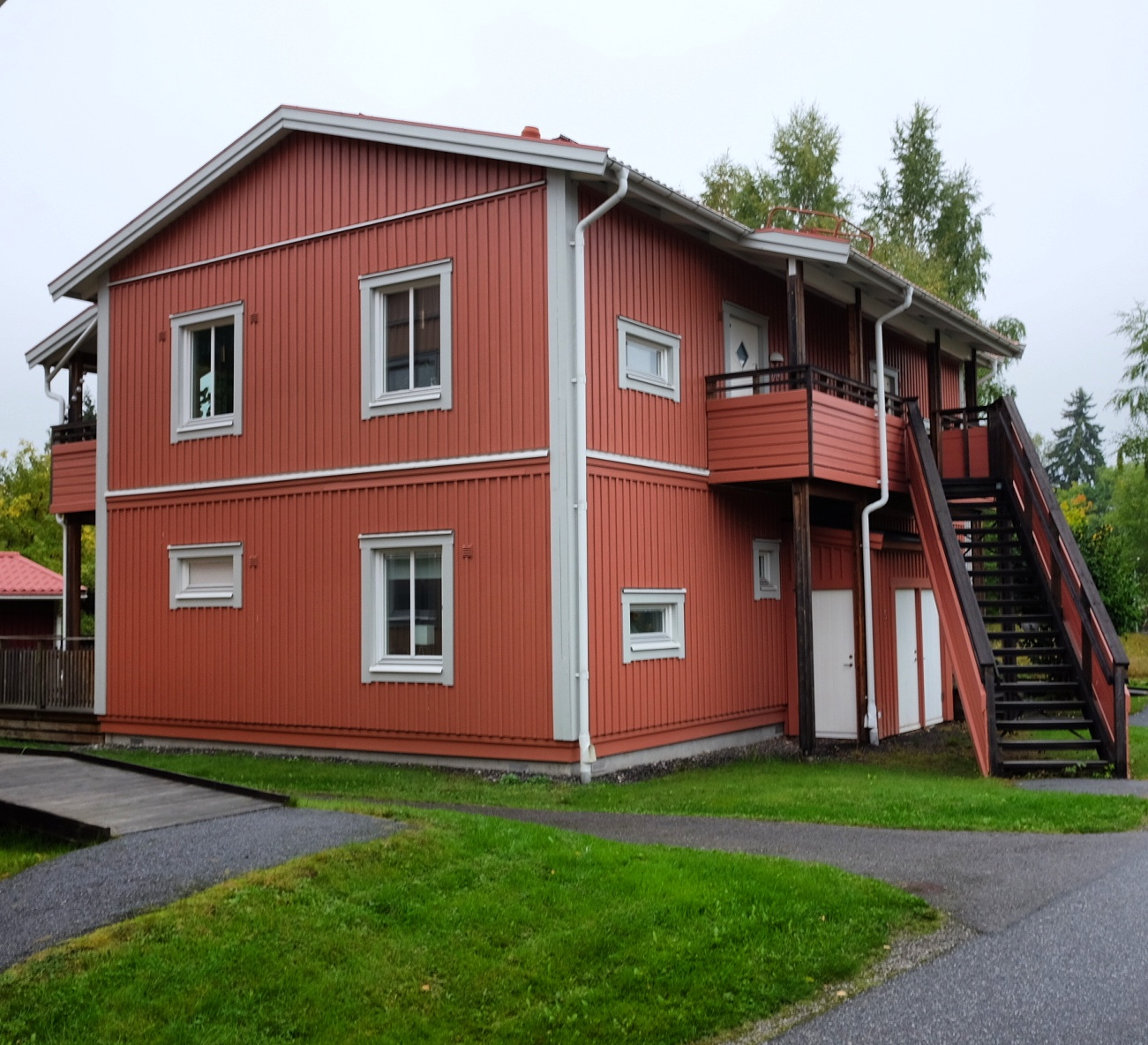 Upplands Väsby, lägenhetshus.